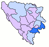 BosniaRegion Foca